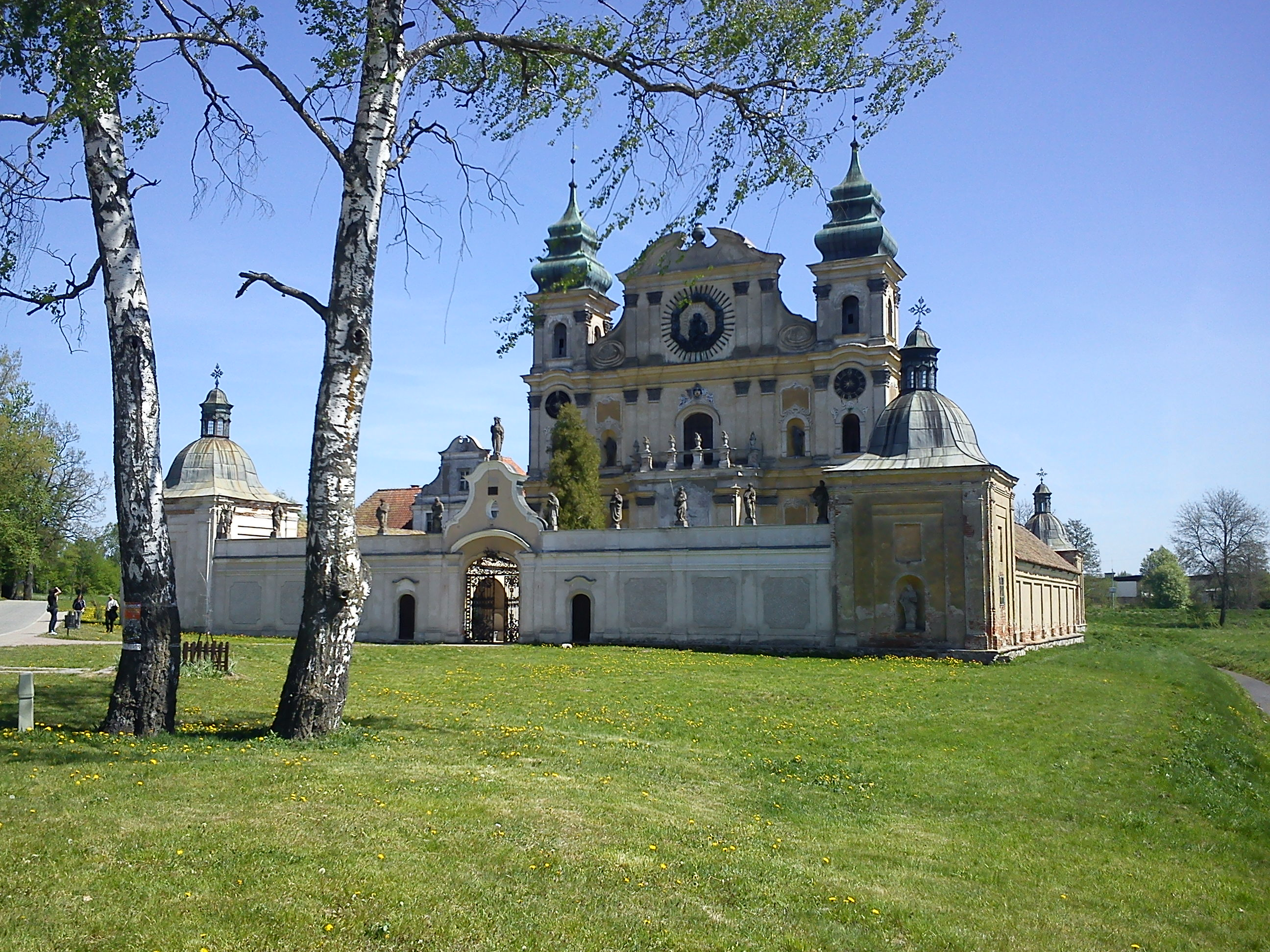 Krosno, kościół odpustowy p.w. Nawiedzenia NMP i św. Józefa, 1715-1720